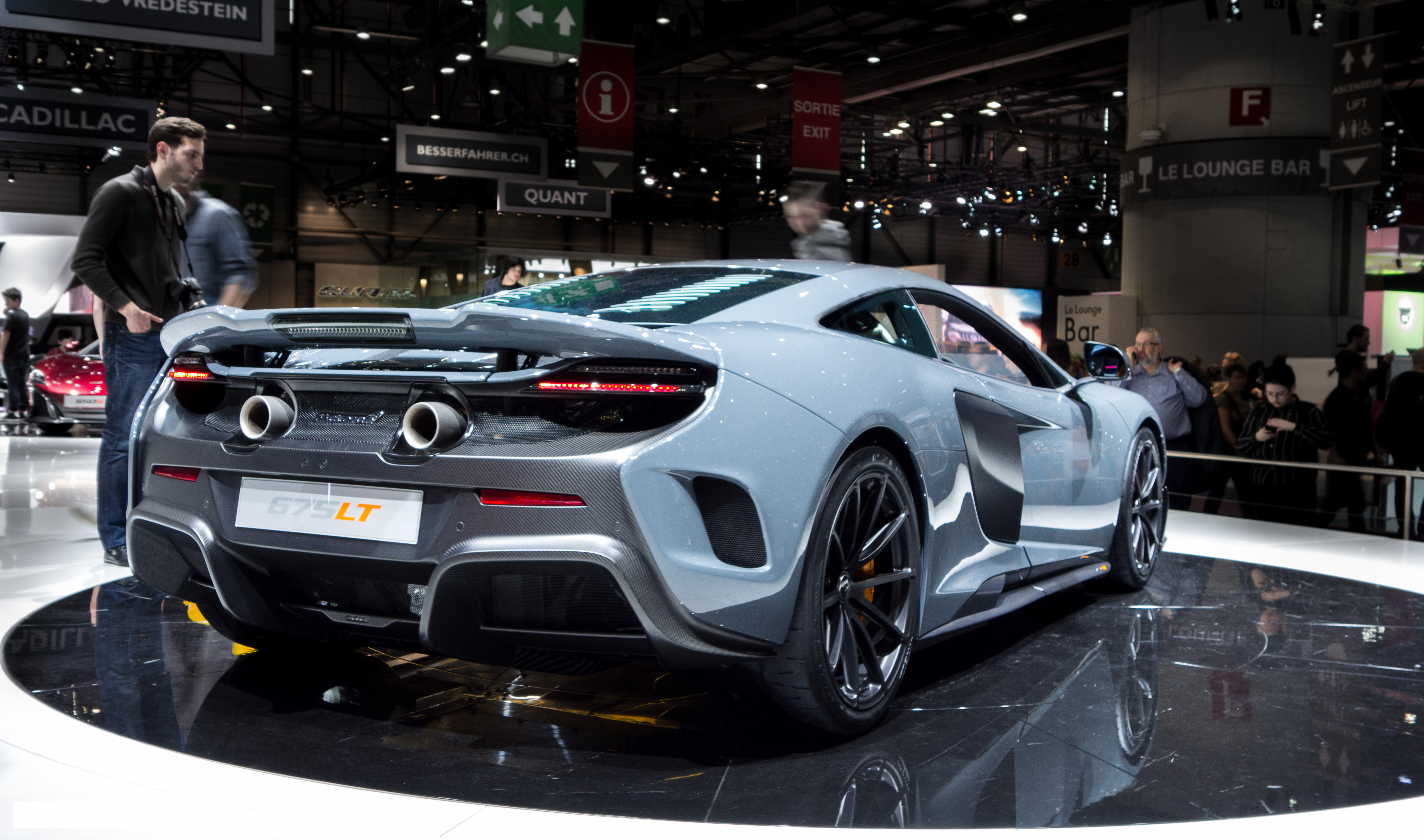 McLaren 675 LT 3.8 '16